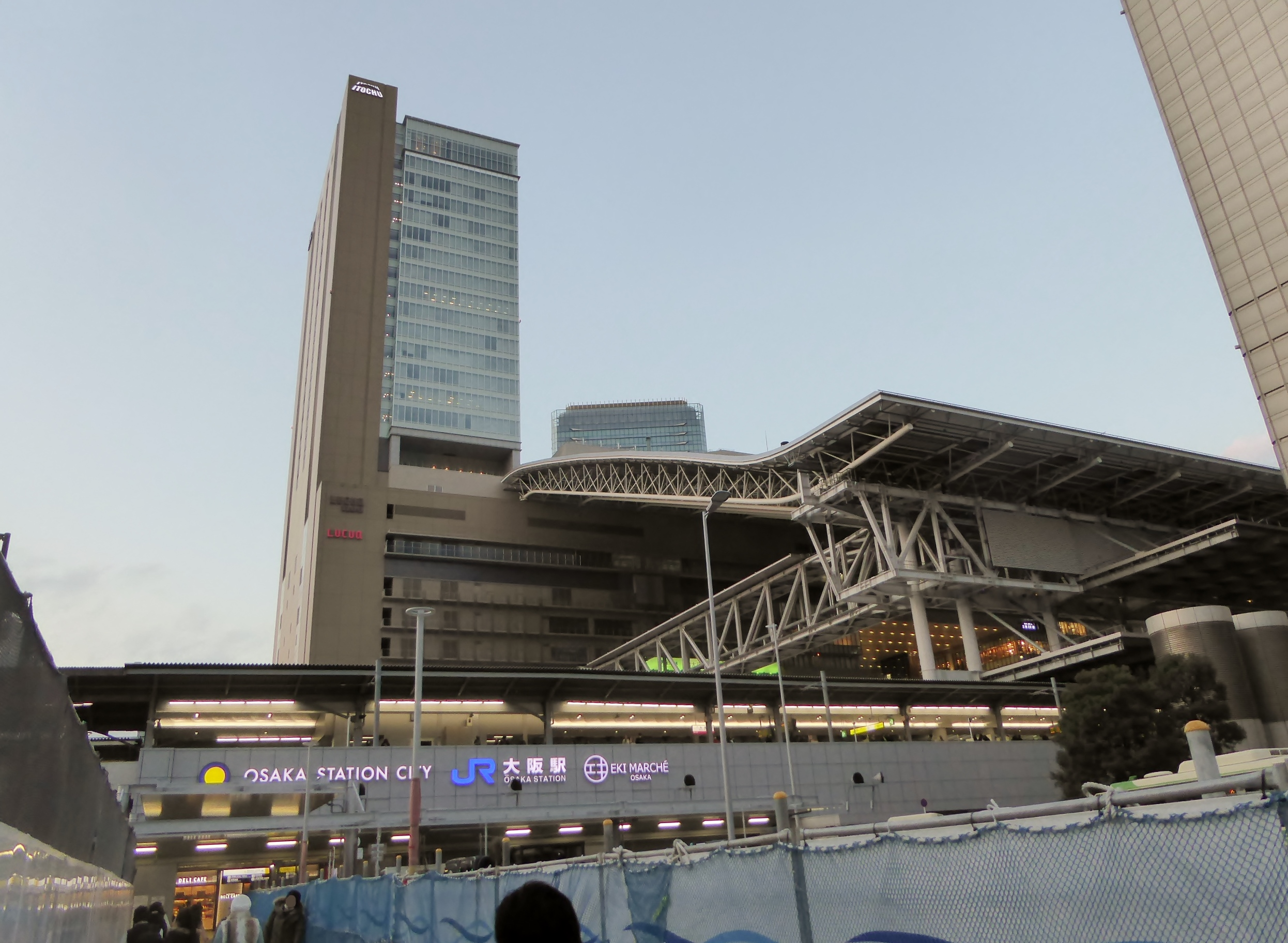 2015年2月14日時点のノースゲートビルディングを撮影。 Panasonic Lumix DMC-TZ60